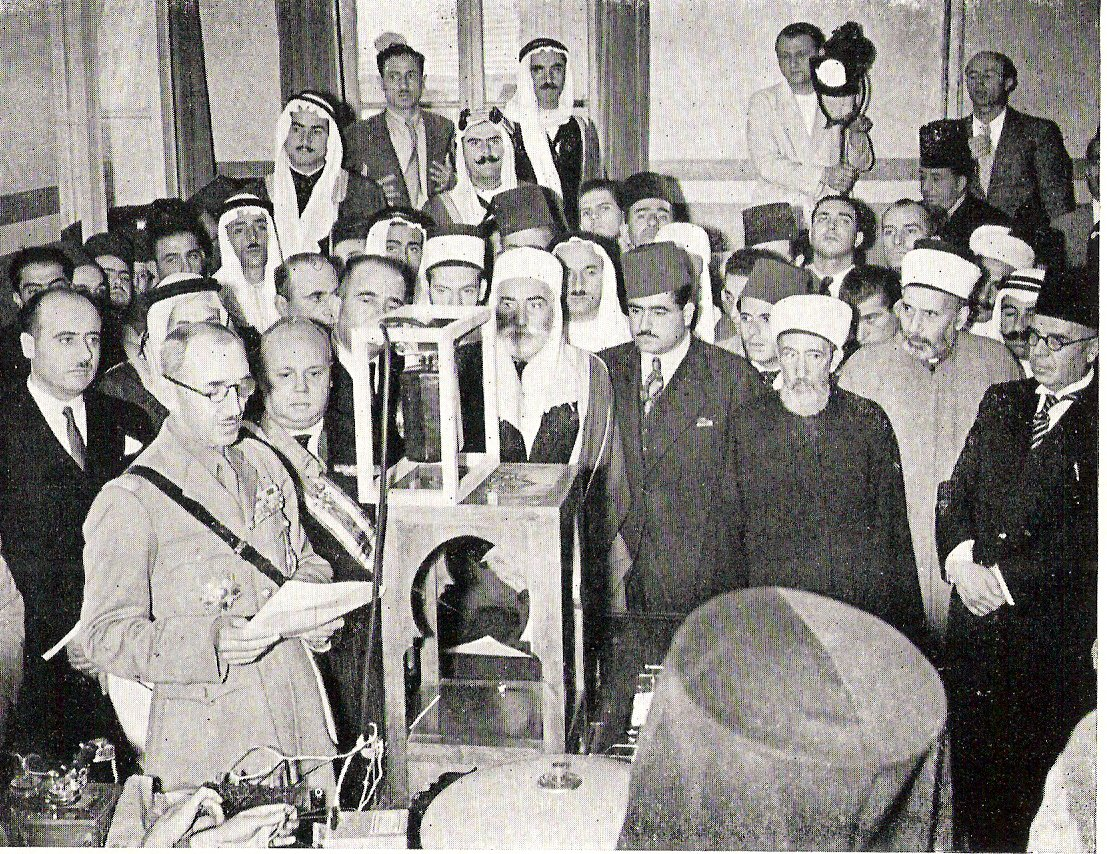 גנרל קטרו מכריז על עצמאות לסוריה ביום 14 ביוני 1941, עם כיבושה בידי צבא צרפת החופשית